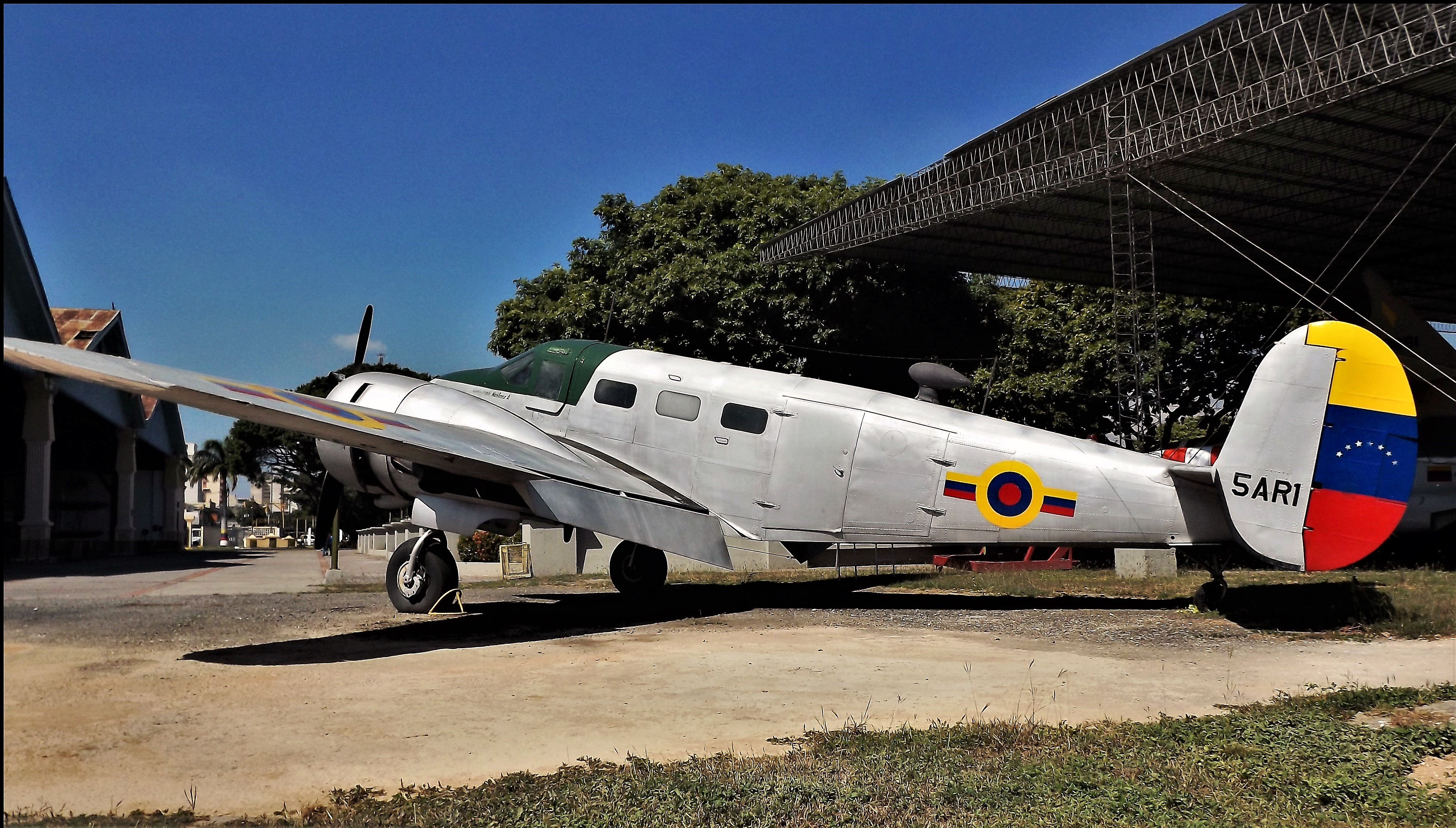 Beechcraft D18S (5AR1)